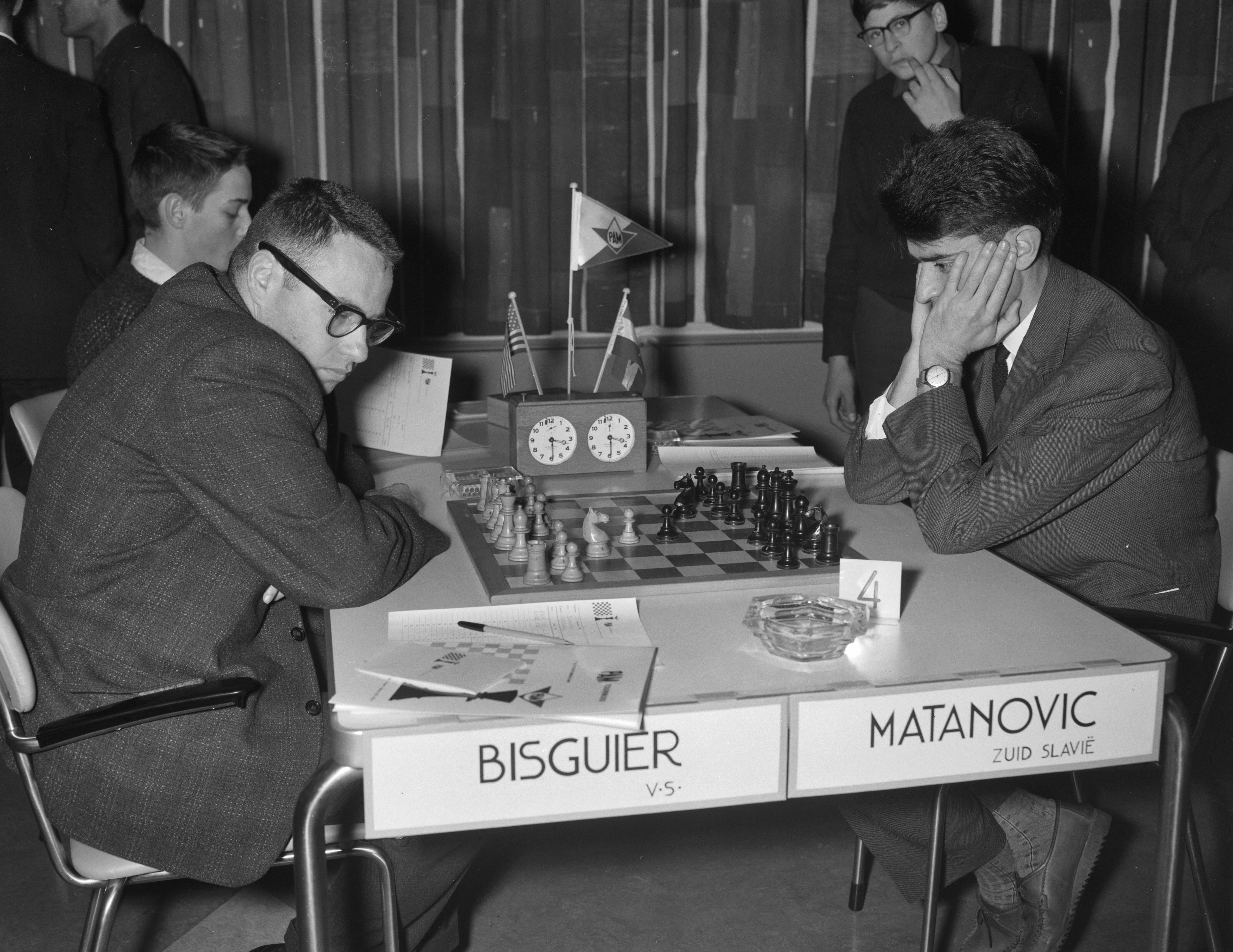 Collectie / Archief : Fotocollectie Anefo Reportage / Serie : [ onbekend ] Beschrijving : Internationaal Schaaktoernooi (PAM-toernooi) in Utrecht. Bisquier (VS) tegen Matanovic (Zuid-Slavie) Datum : 7 december 1961 Locatie : Utrecht Trefwoorden : Schaaktoernooien Fotograaf : Bilsen, Joop van / Anefo Auteursrechthebbende : Nationaal Archief Materiaalsoort : Negatief (zwart/wit) Nummer archiefinventaris : bekijk toegang 2.24.01.04 Bestanddeelnummer : 913-2672